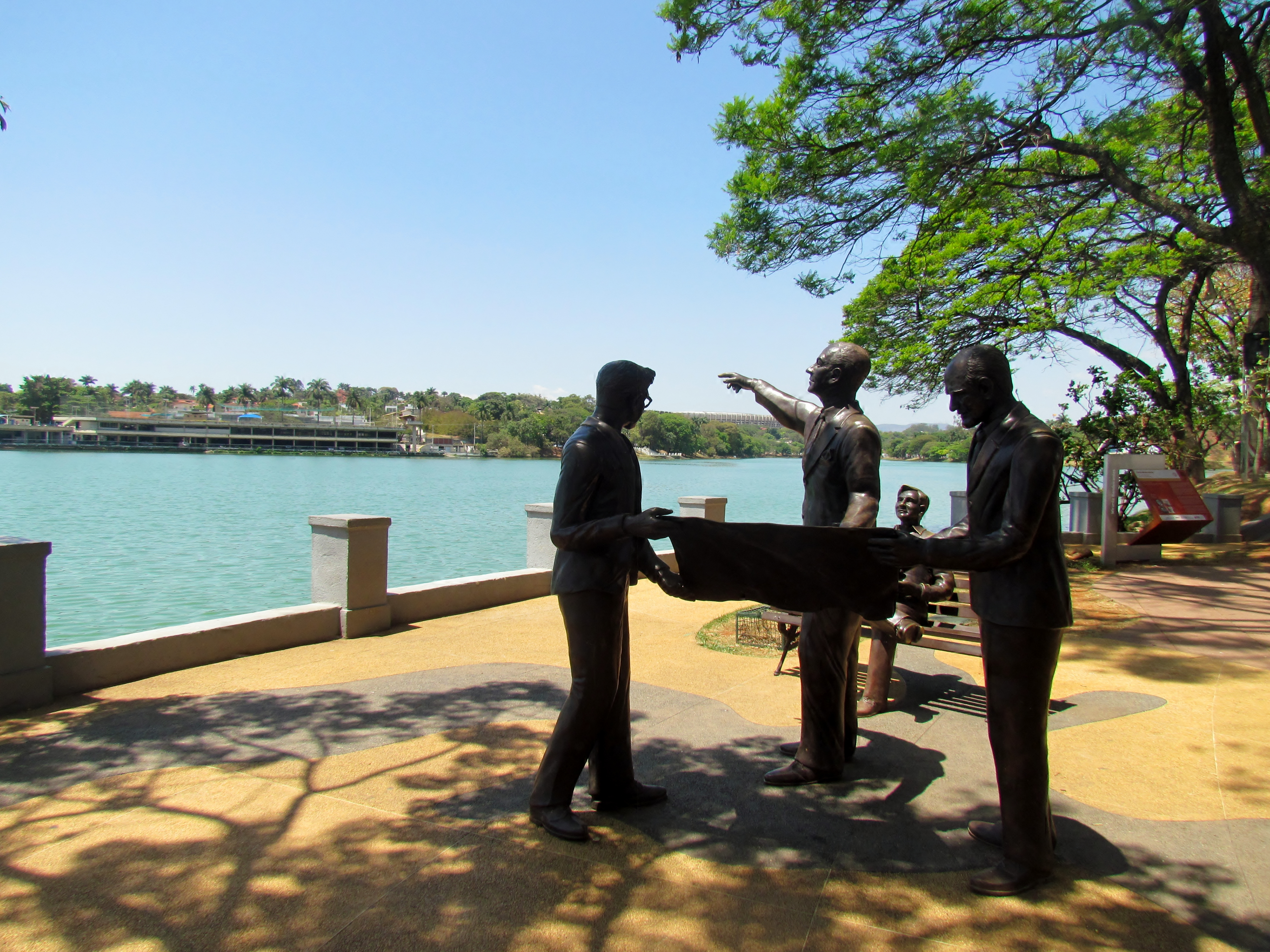 Esculturas de Juscelino Kubitschek, Oscar Niemeyer, Cândido Portinari e Burle Marx no Mirante Bandeirantes, Lagoa da Pampulha, Belo Horizonte, Minas Gerais